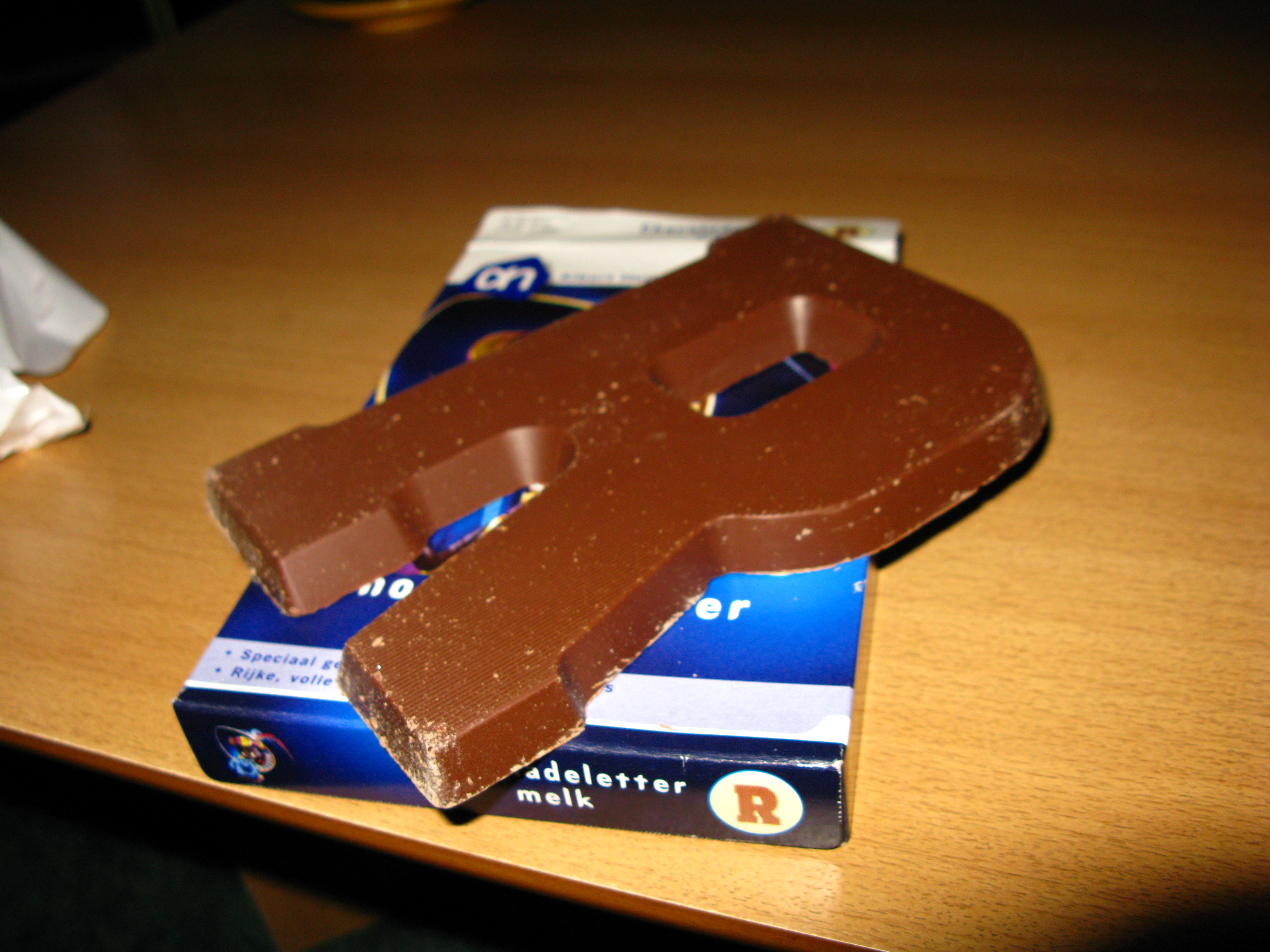 Chocoladeletter R melk van de Albert Heijn